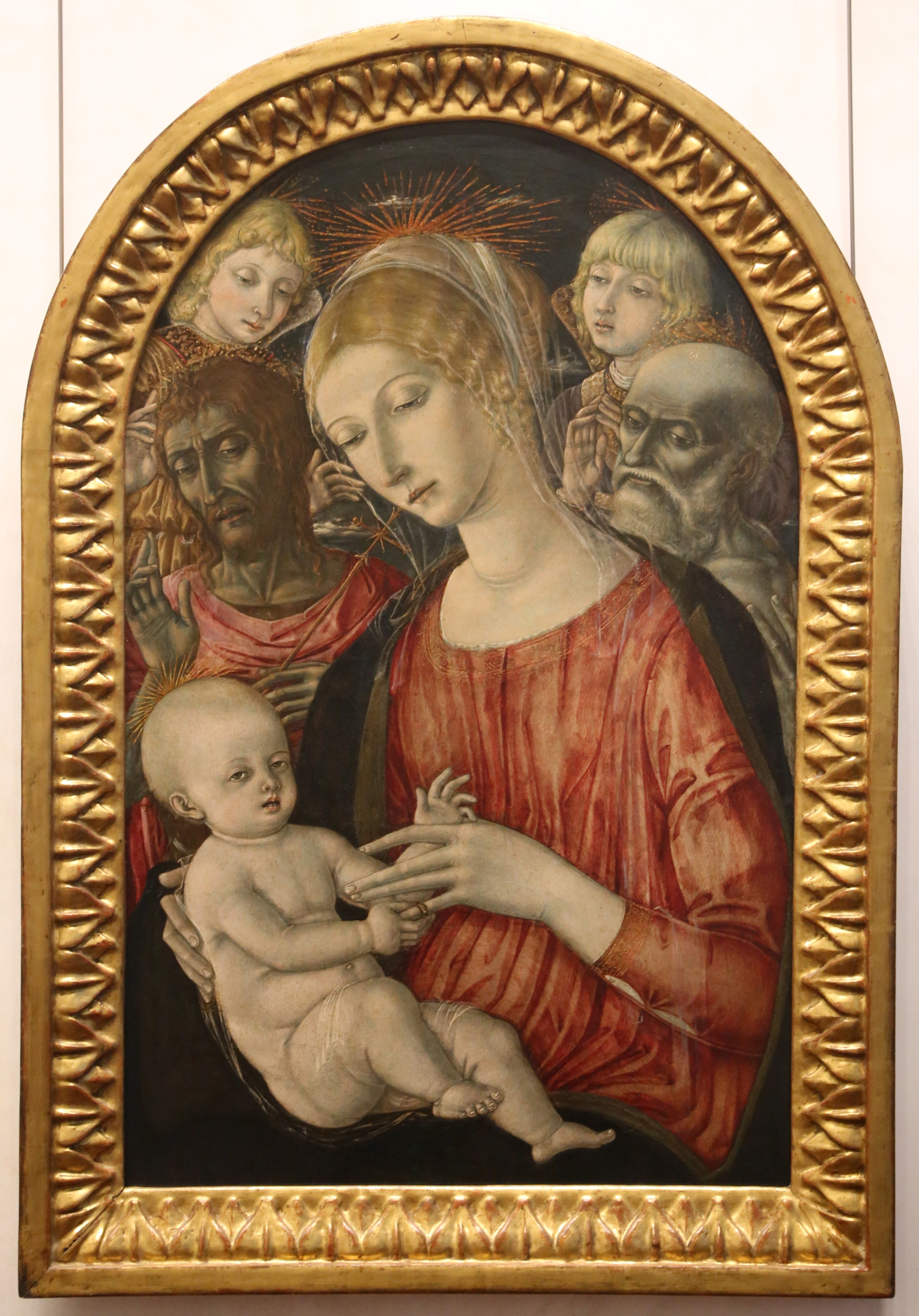 Matteo di Giovanni: Madonna, ca. 1460-70, Uffizien, Florenz